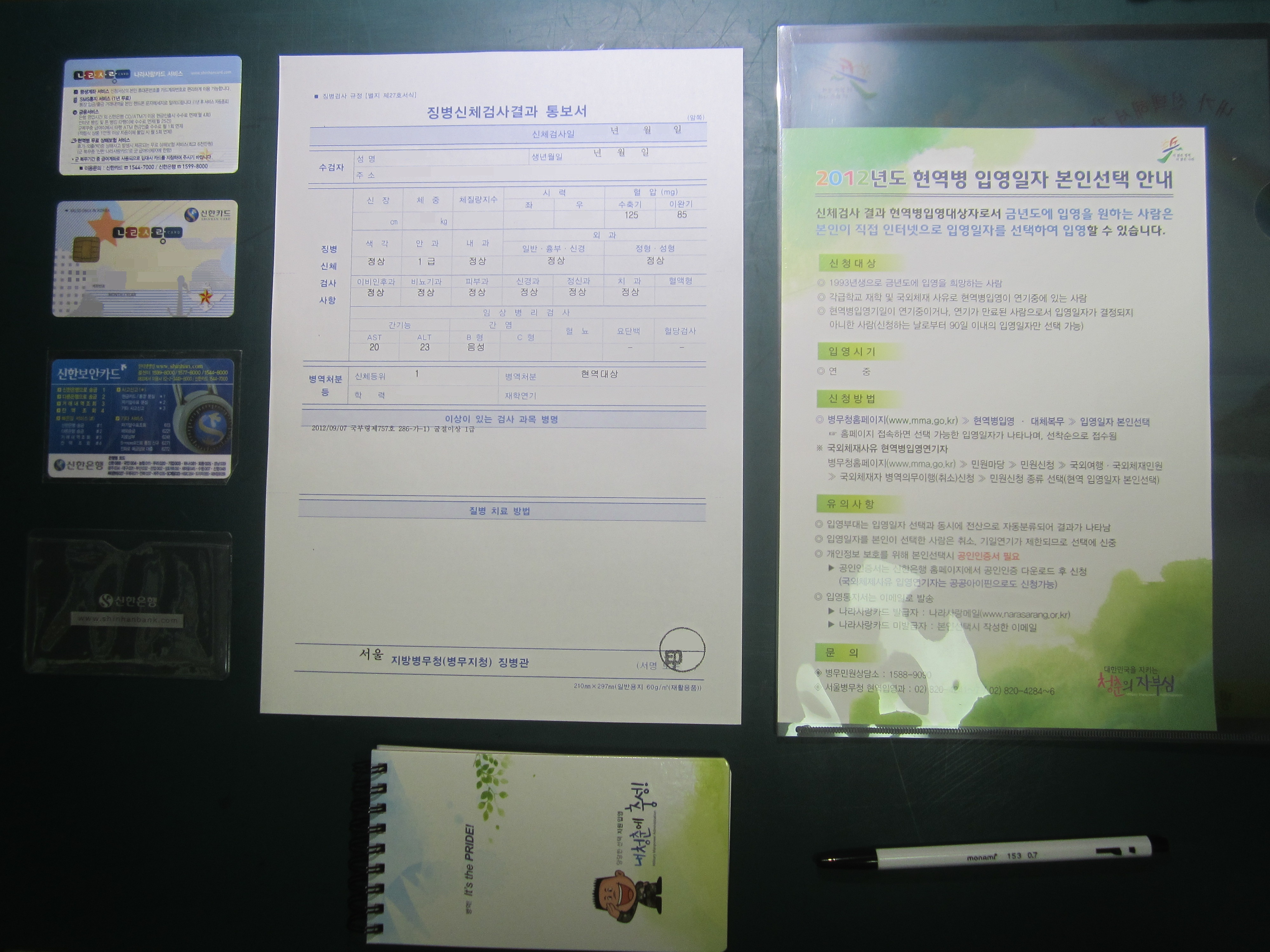 좌측 상단 부터 우측으로 나라사랑카드 안내, 나라사랑카드, 신한은행 보안카드, 카드보호대, 징병신체검사결과 통지서, 병무노트, 현역병 입영일자 본인선택안내서, 모나미 153 볼펜